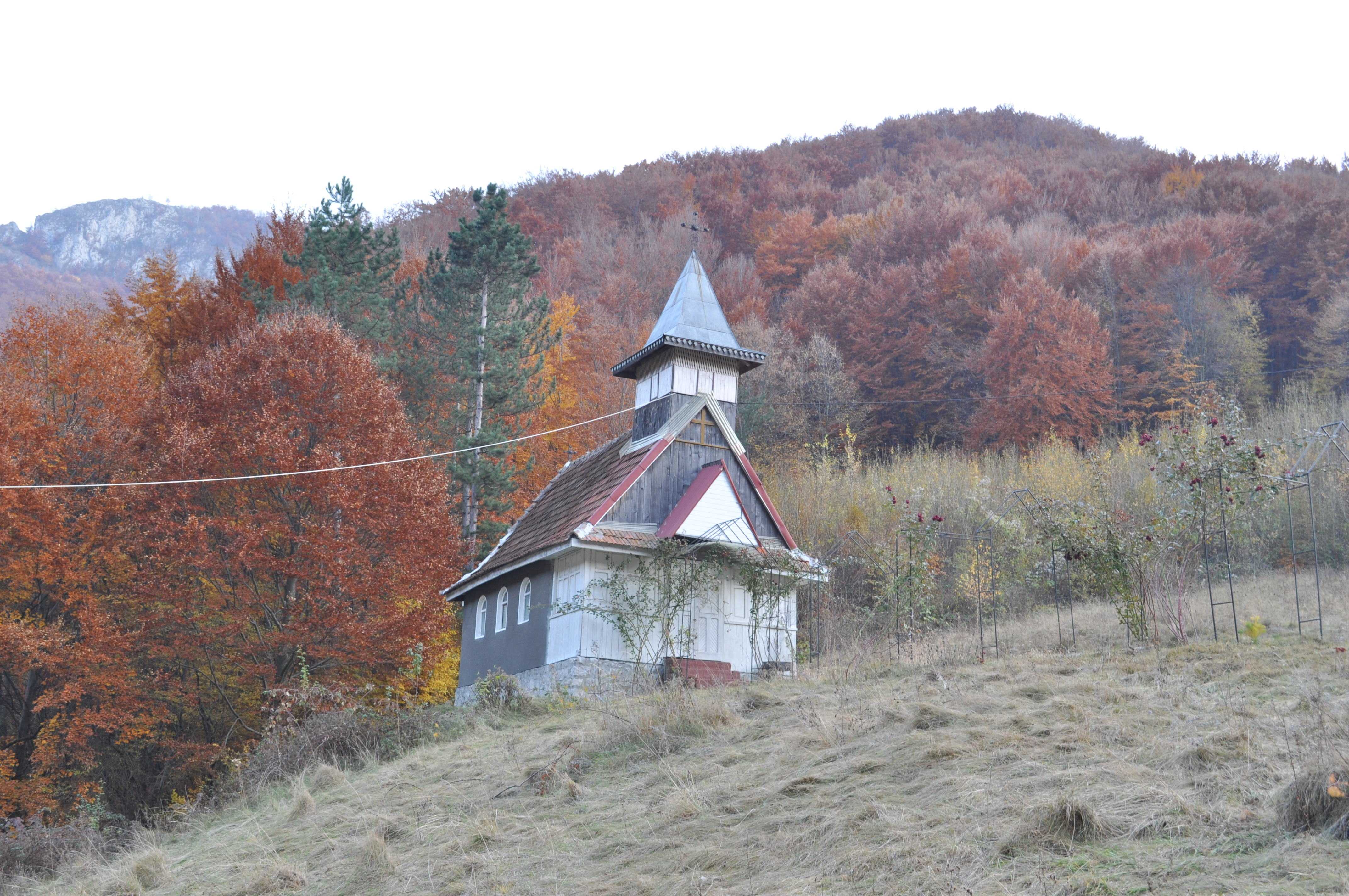 Galda de Sus, județul Alba